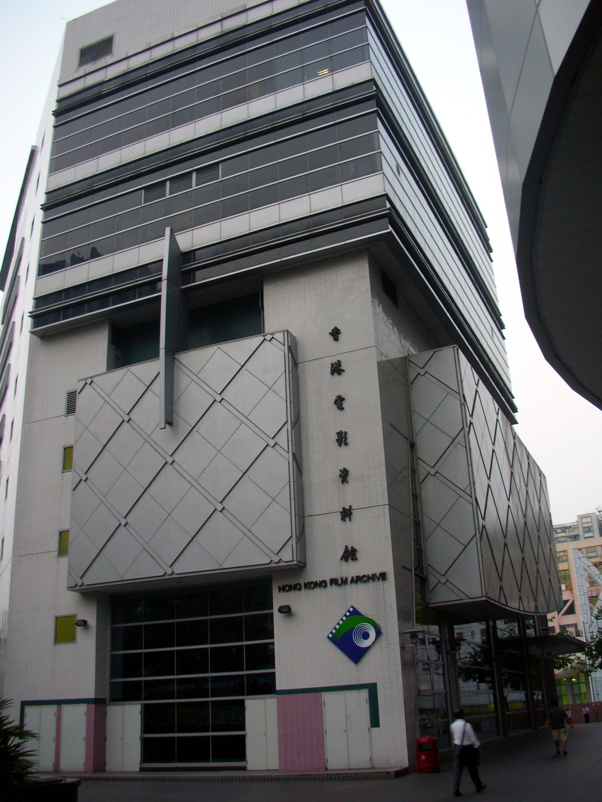 Hong Kong Film Archive, Sai Wan Ho, Hong Kong 香港電影資料館，位於香港西灣河。